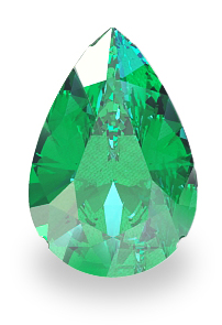 Smaragd, in Tropfenform geschliffen